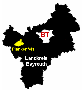 Lage der Gemeinde Plankenfels in der Fränkischen Schweiz